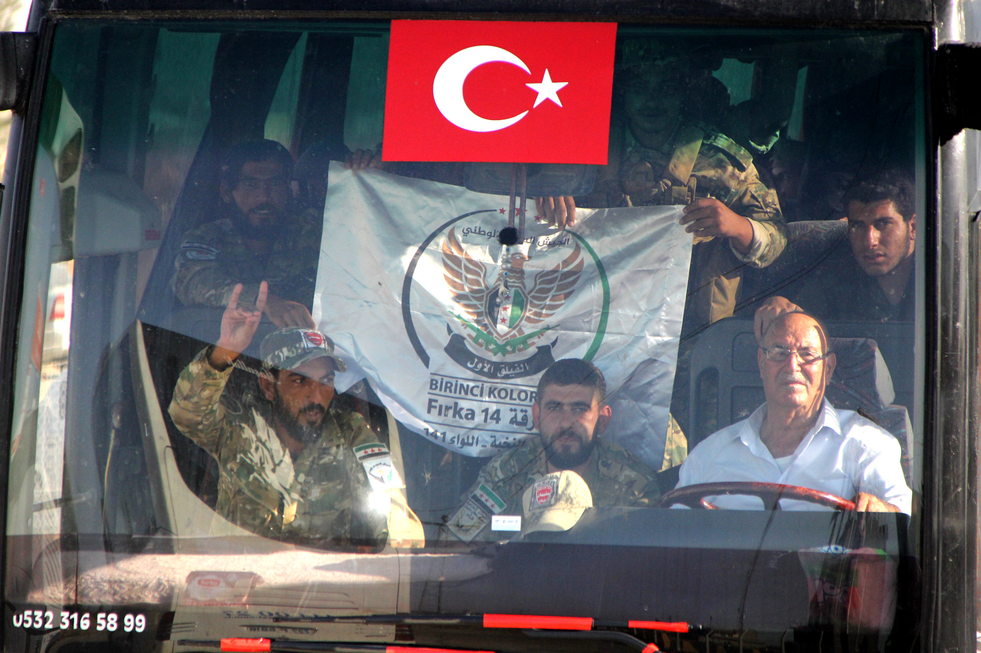 Azez’den Akçakale’ye gelen ve Geçici Barınma Merkezi'ne getirilen ÖSO konvoyu.